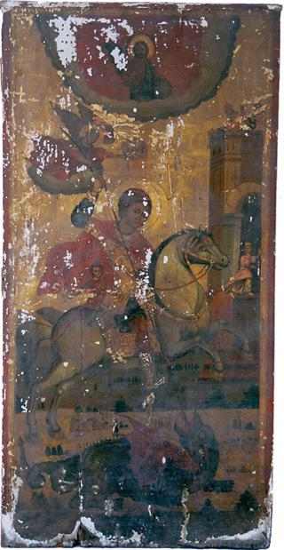 „Свети Георги“, 46 Χ 91 Χ 3. Ο ΑΓΙΟC ΓΕΩΡΓΙΟς αωϞθ [= 1899] διὰ χειρὸς Ἀβραάμ τοῡ / πα# Ἀνδρέου